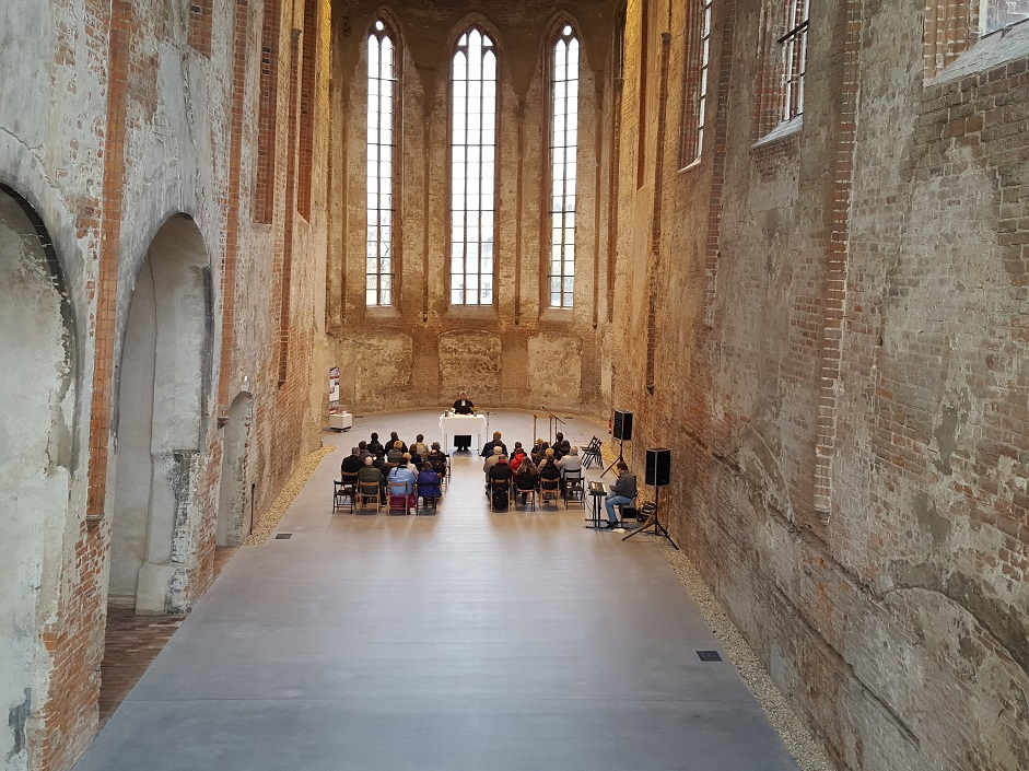 Erster Gottesdienst der Reformierten Gemeinde in der Kirche St.Johannis in Brandenburg nach Sanierung und Bundesgartenschau am Ostersonntag 2016